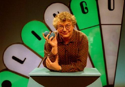 François Boulangé als presentator van Lingo